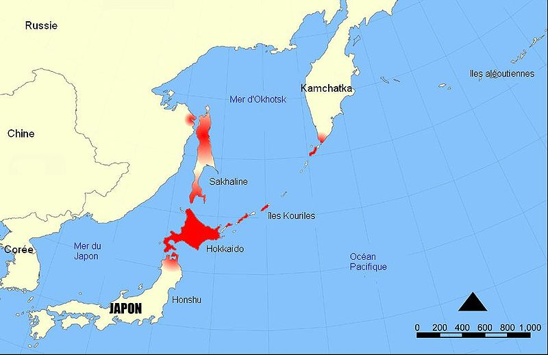 Idioma ainu